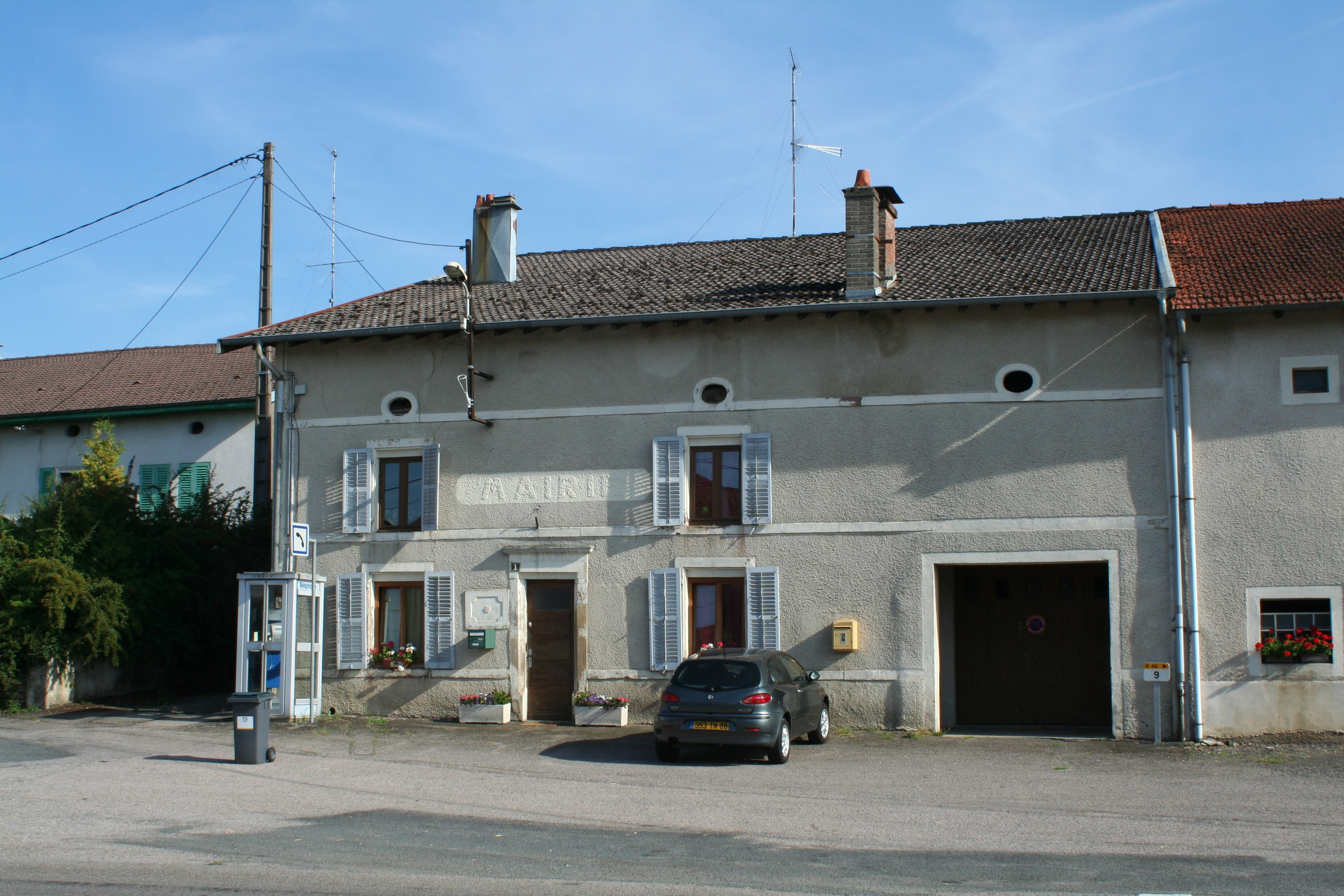 Ancienne mairie de Vomécourt (Vosges)